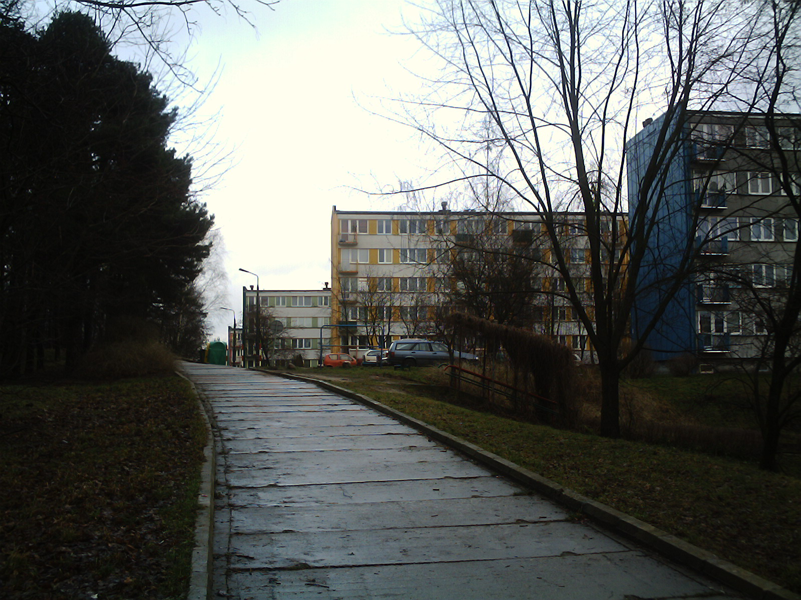 Autor zdjęcia B.N.